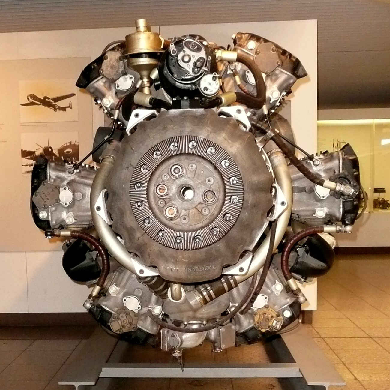 Junkers Jumo 222 E Flugzeugmotor Baujahr 1944 von vorne gesehen. Ausgestellt im deutschen Museum München.